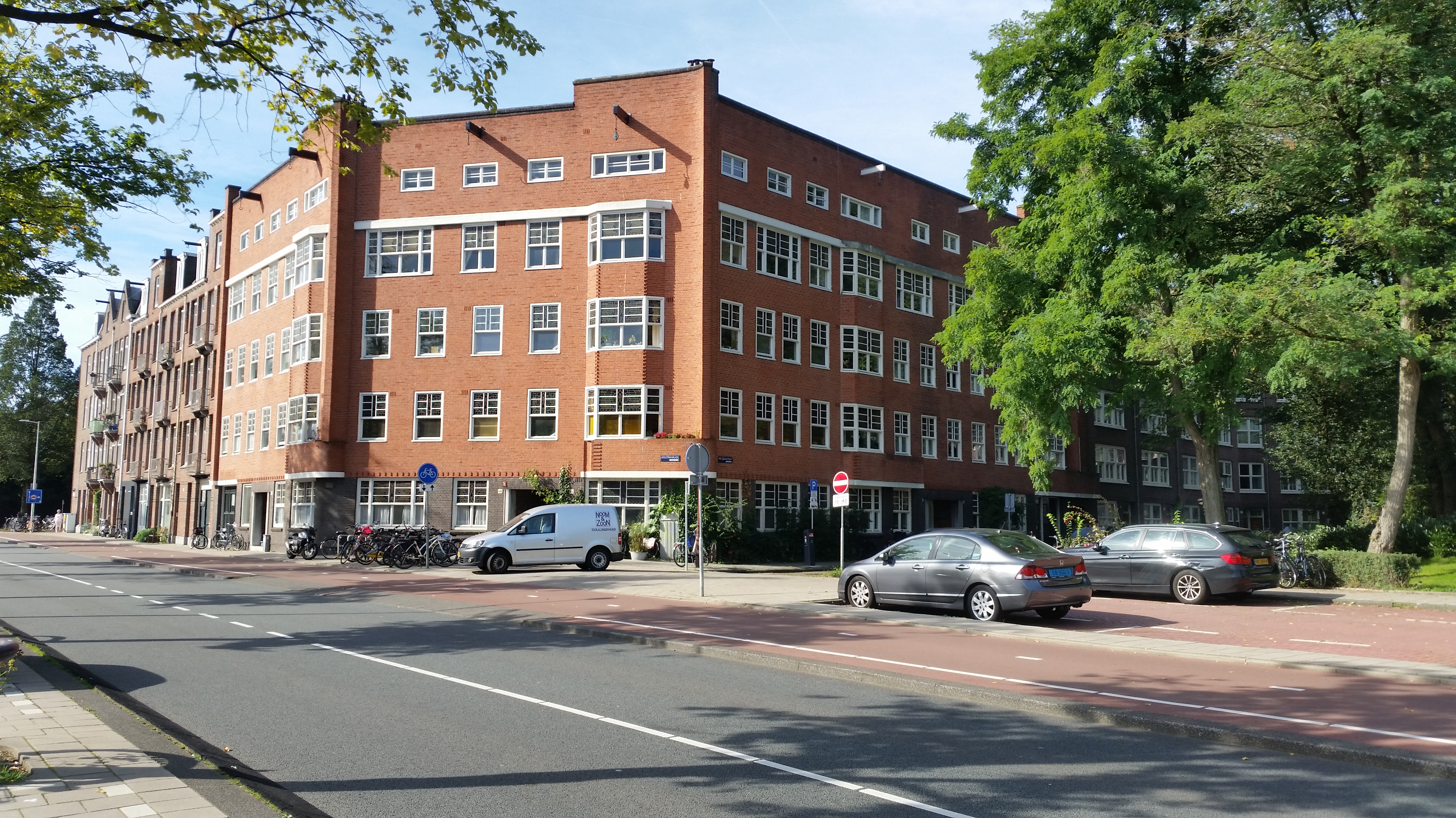 Houtmankade hoek Westzaanstraat, Amsterdam met een bouwwerk van Ferdinand Frantzen